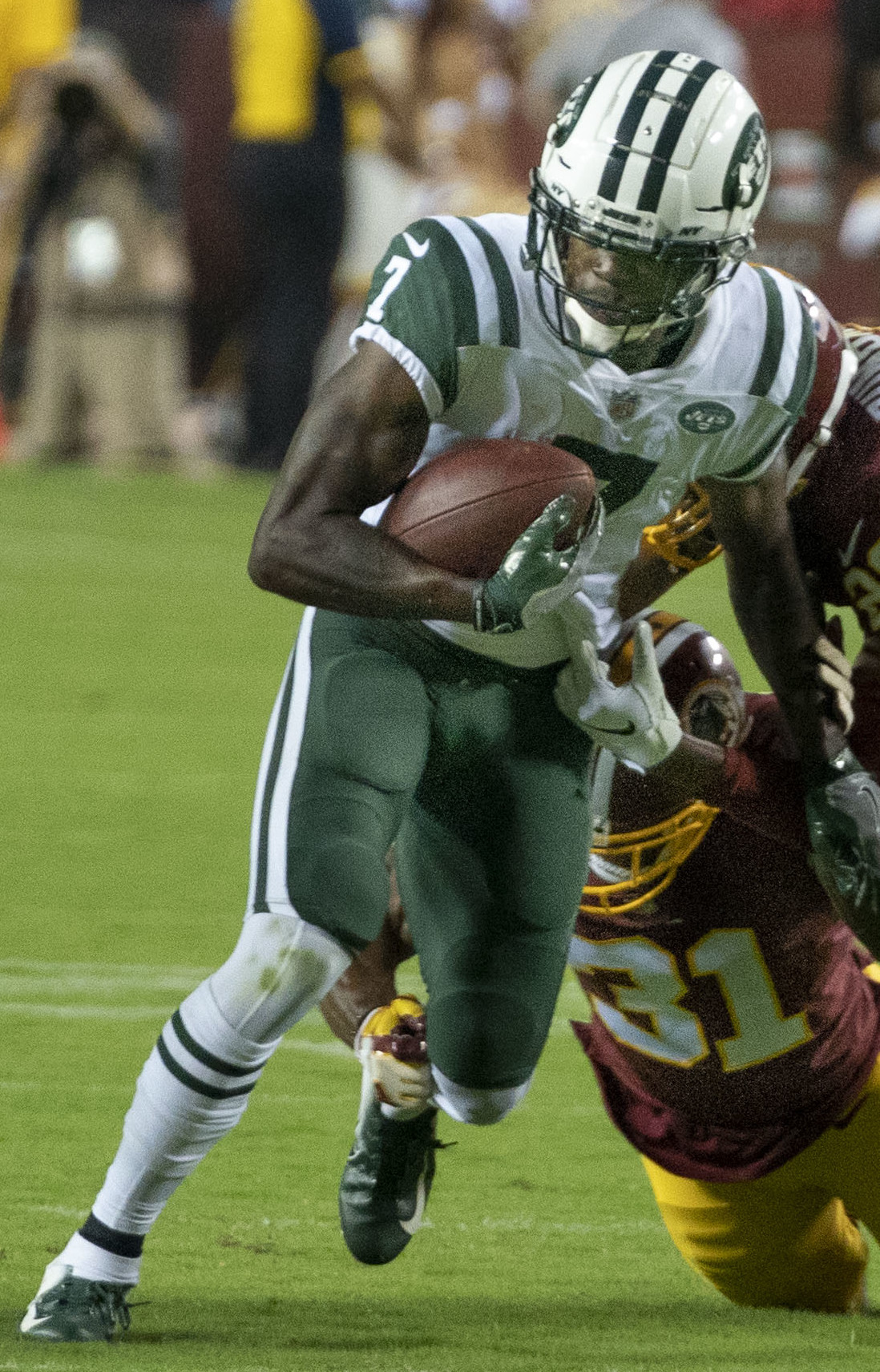 Jets at Redskins 8/16/18